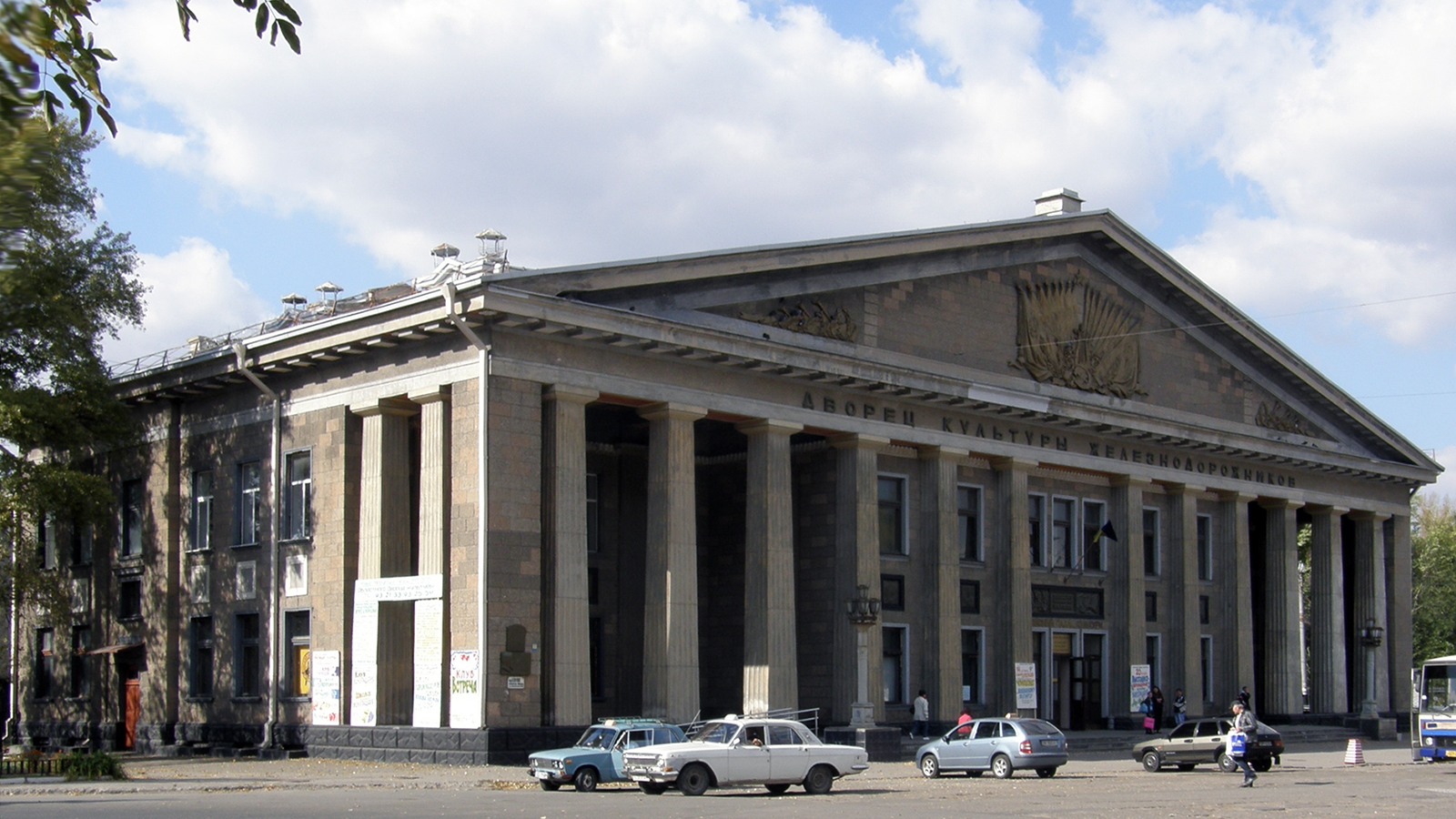 ныне областной луганский